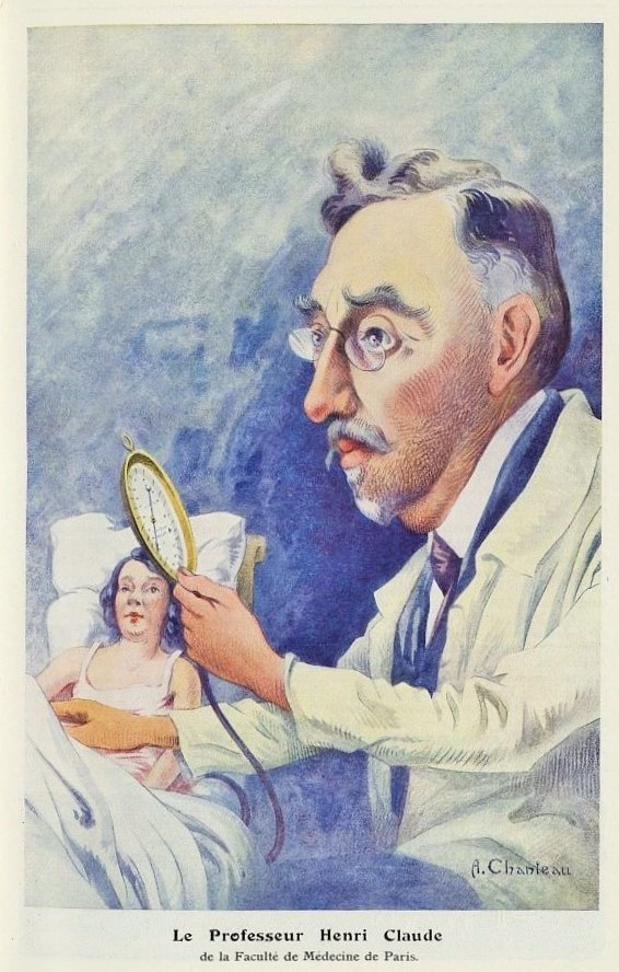 Le Professeur Henri Claude (portrait charge par A. Chanteau) Chanteclair . - 1925. - 20e année Pour établir des liens vers ce document, utiliser les URL ci-dessous : Livre : Page